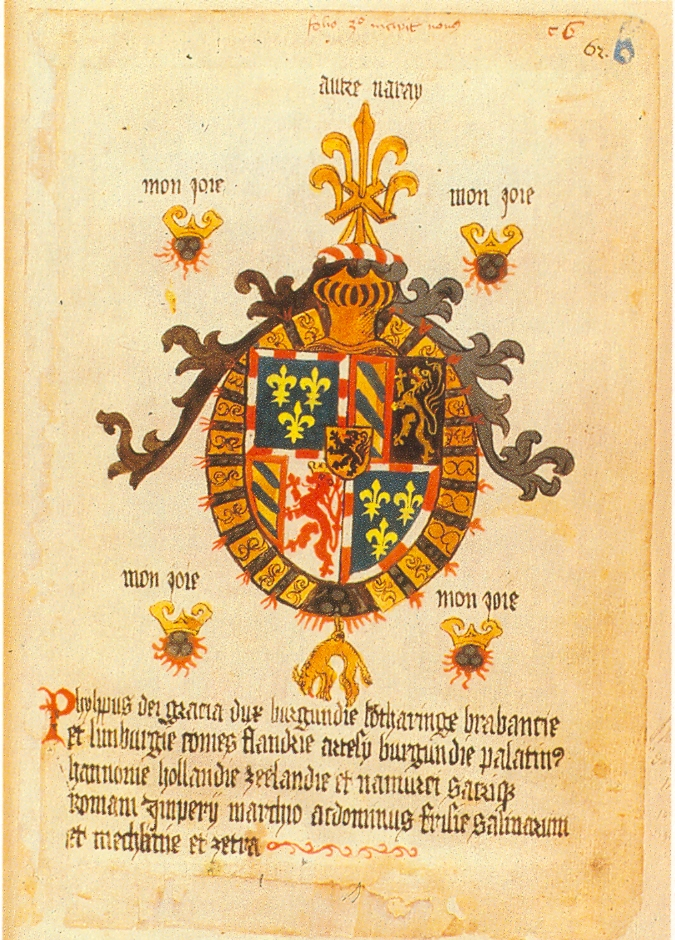 Ingeram-Codex der ehemaligen Bibliothek Cotta folio 30 incipit novus mon joie/autre naray/mon joie/mon joie/mon joie Phyl(i)ppus dei gracia dux burgundie lotharinge brabancie/et limburgie comes flandrie artesy burgundie palatin(us), hannonie hollandie zeelandie et namurci sacriq(ue)/romani Impery marchio ac dominus frisie salinarum/et mechlinie et zetra (Herzog Philipp der Gute vom Burgund, 1396-1467)